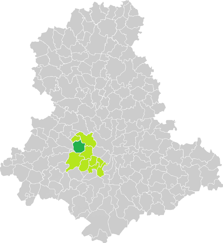 Carte de situation de la commune de Saint-Priest-sous-Aixe (en vert foncé) dans le votre Canton (en vert clair) sur une carte des communes de la Haute-Vienne